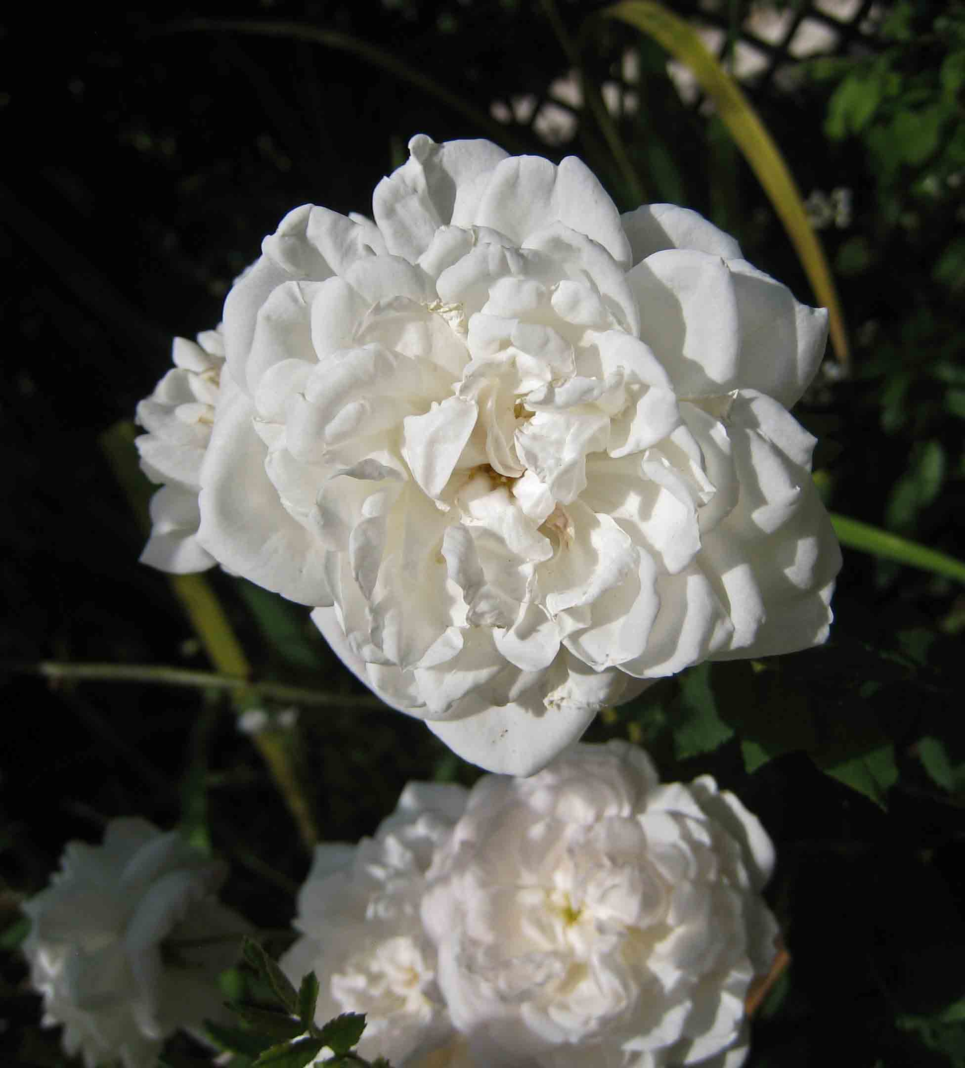 Alba rose